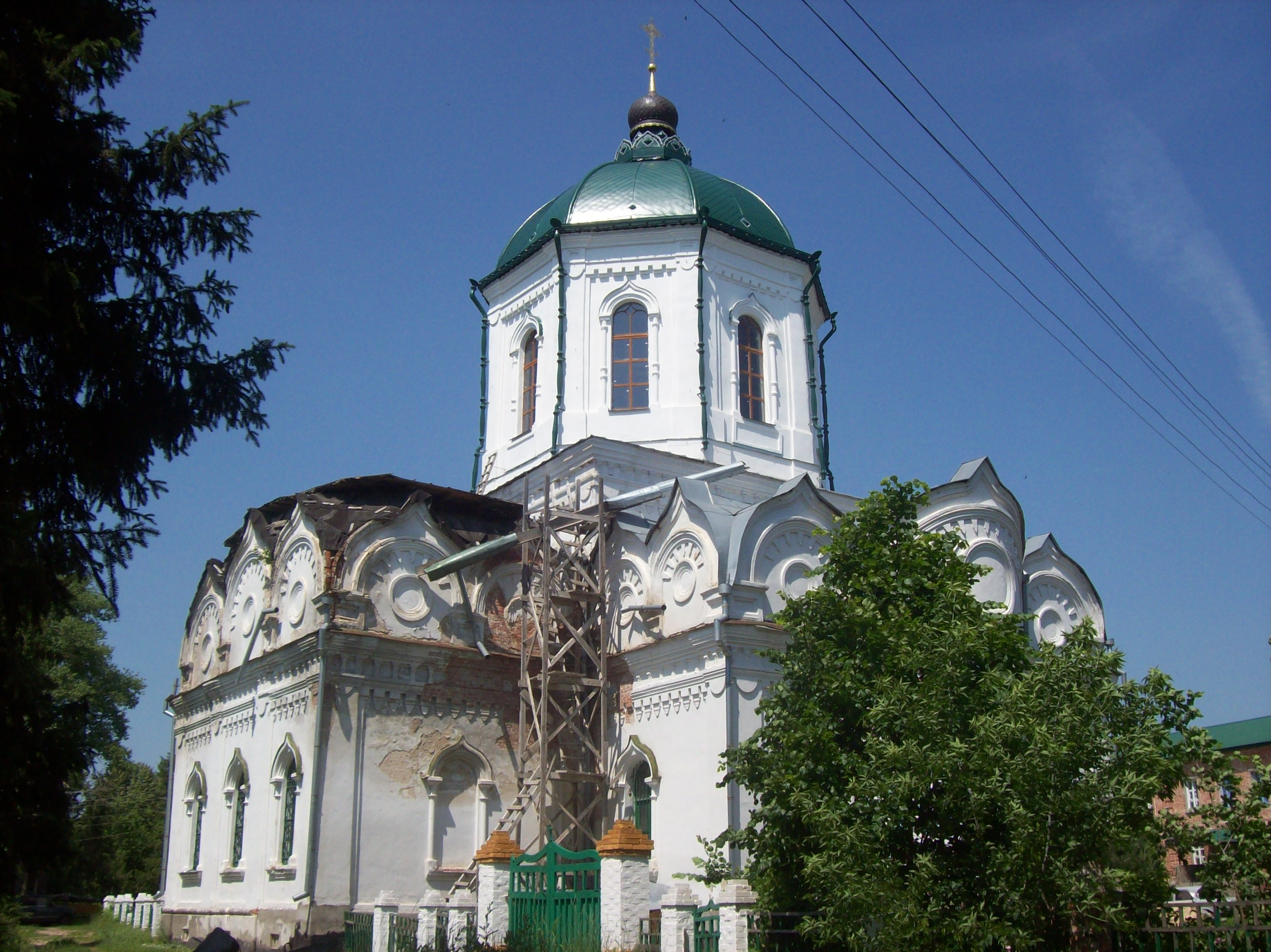 Воронежская область. Храм в Толшевском Спасо-Преображенском женском монастыре